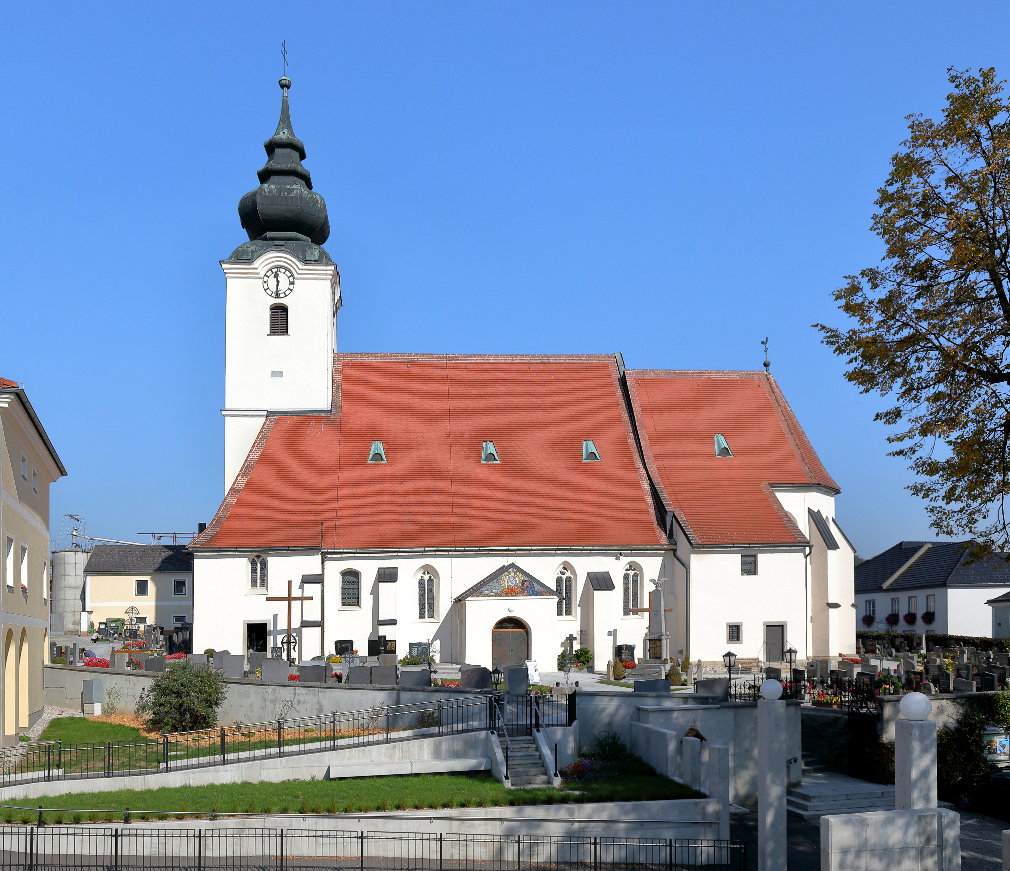 Südansicht der röm.-kath. Pfarrkirche hl. Georg in der niederösterreichischen Marktgemeinde St. Georgen am Ybbsfelde. Eine spätgotische Staffelkirche aus dem 15. Jahrhundert mit einem mittelalterlichen vorgestellten Westturm, der 1773 eine spätbarocke Haube erhielt.